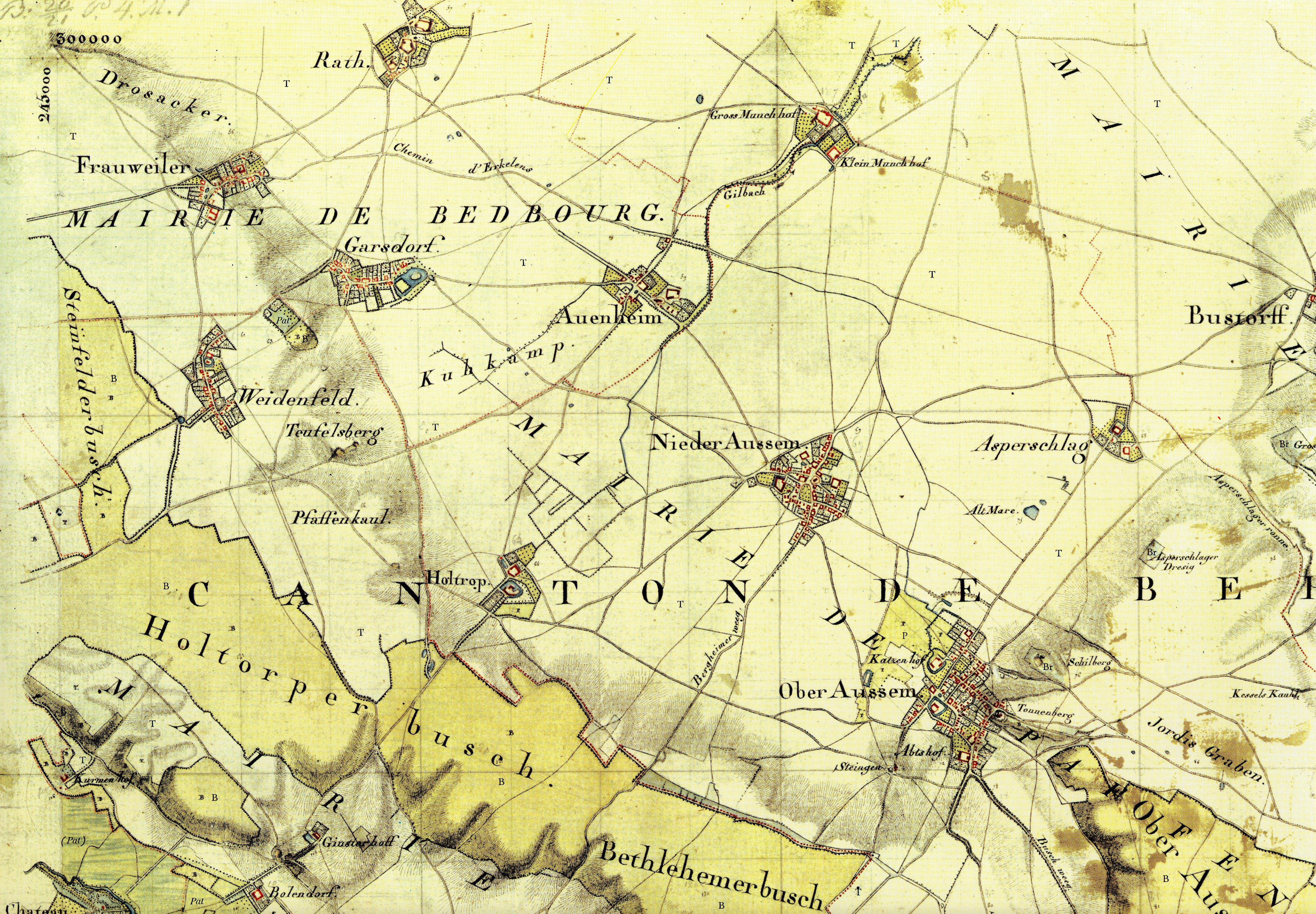 Kartenaufnahme der Rheinlande durch Tranchot und von Müffling 1803-1820 Blatt 70 - Bergheim; hier Detail oben links